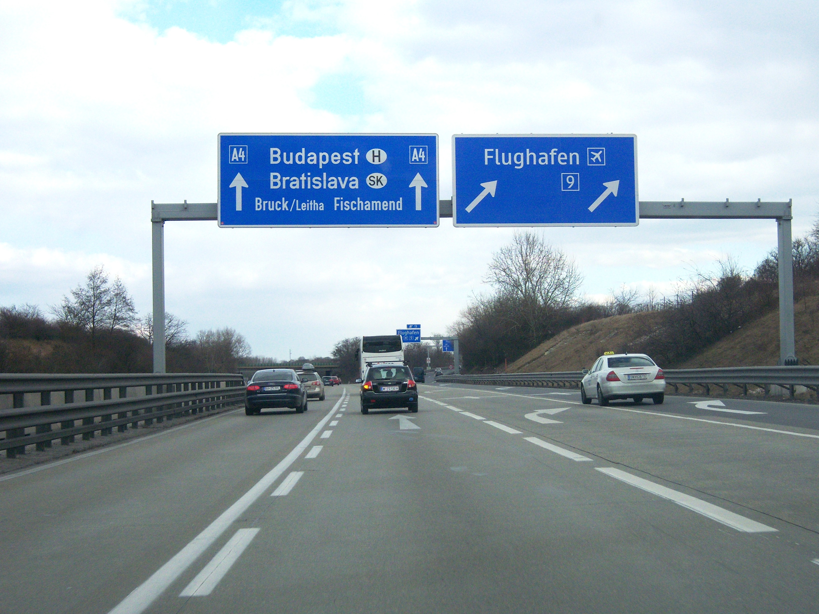 Ost Autobahn A4 Richtung Budapest an der Anschlussstelle Flughafen Wien